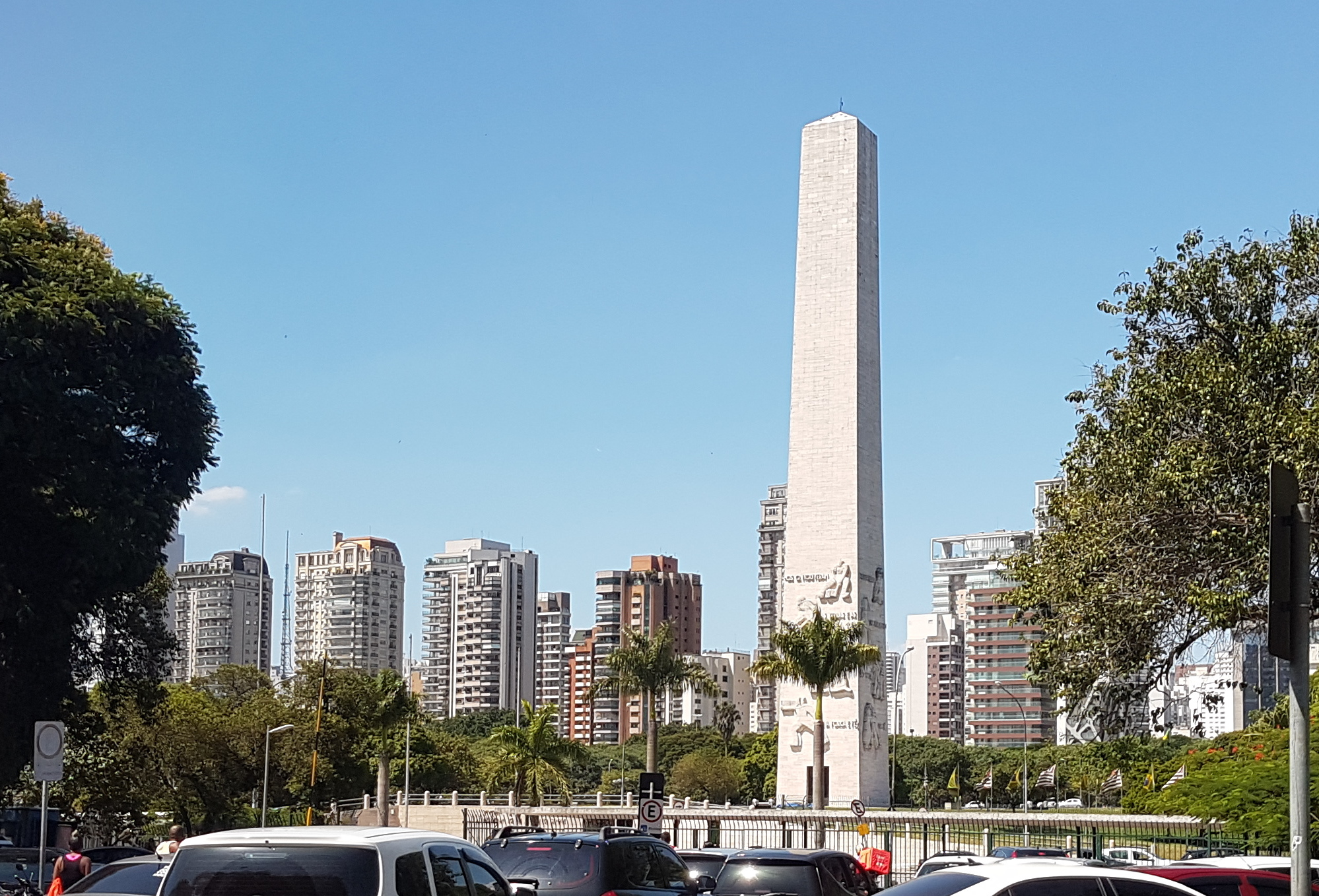 Vista do Obelisco de São Paulo a partir da saída do parque Ibirapuera, São Paulo, Brasil.